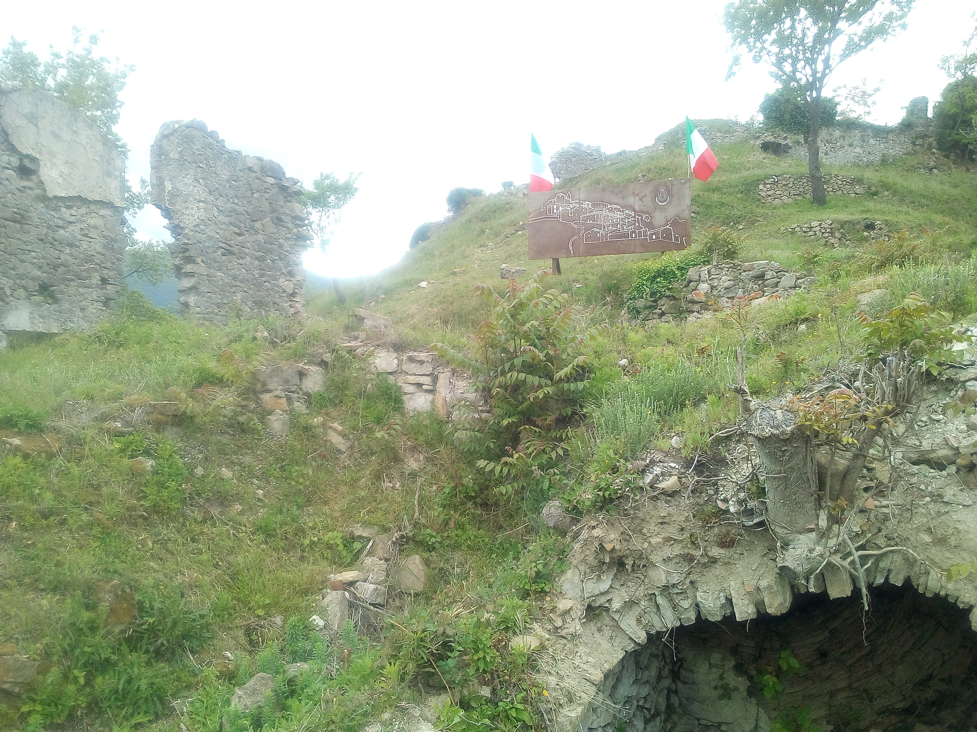 Morino Vecchio (Abruzzo)